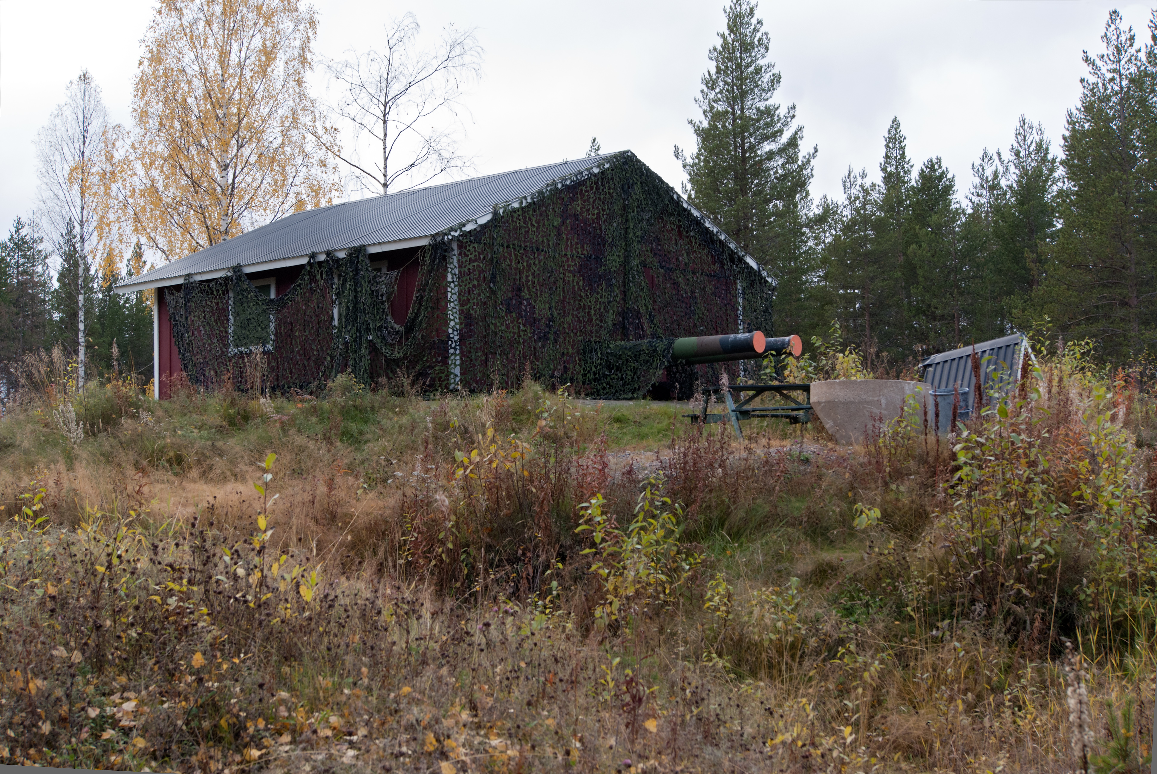 Victoriafortet, anläggning uppe på Bomyrberget.